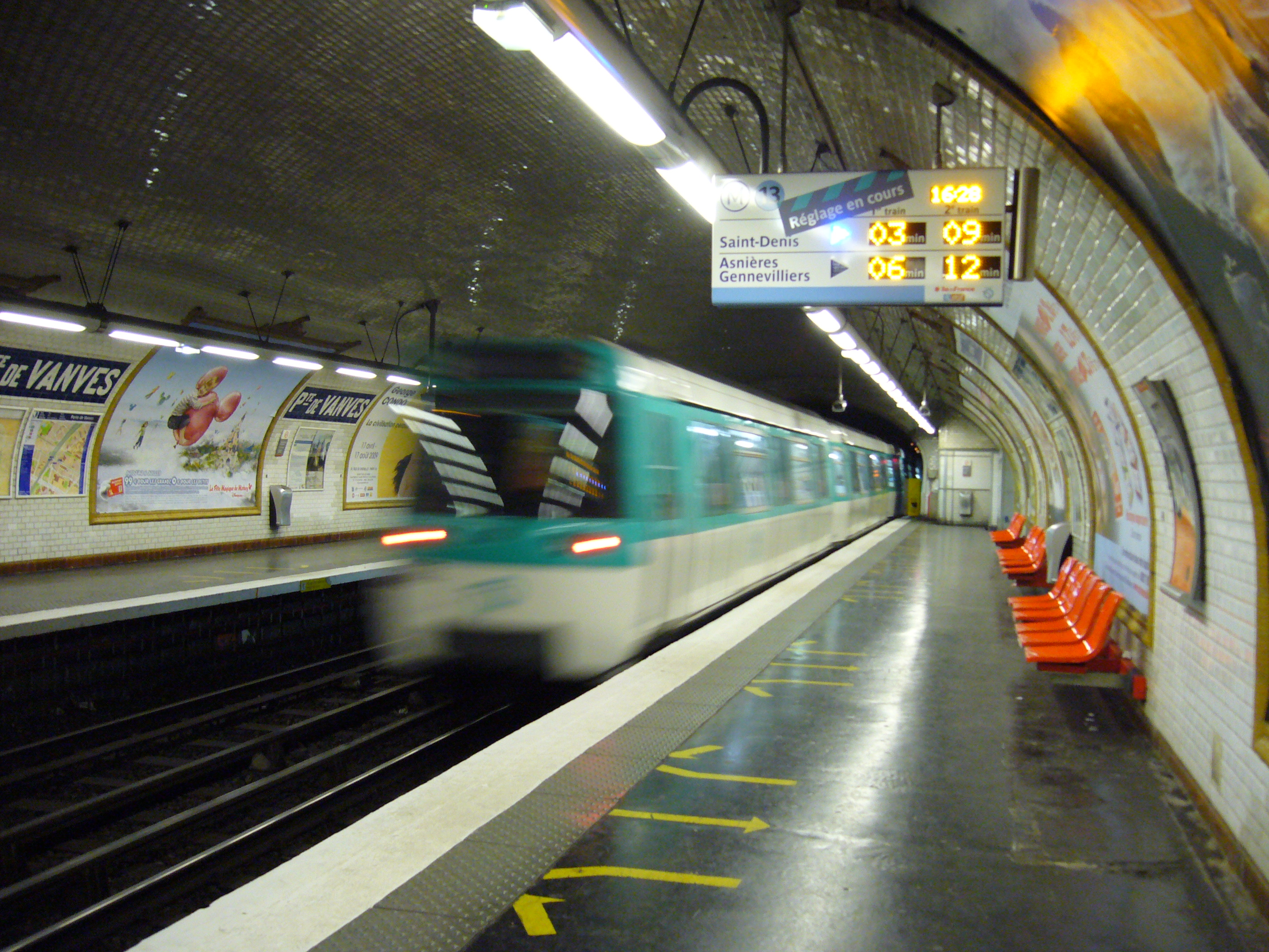 Un MF 77 quitte la station Porte de Vanves sur la ligne 13 du métro de Paris.